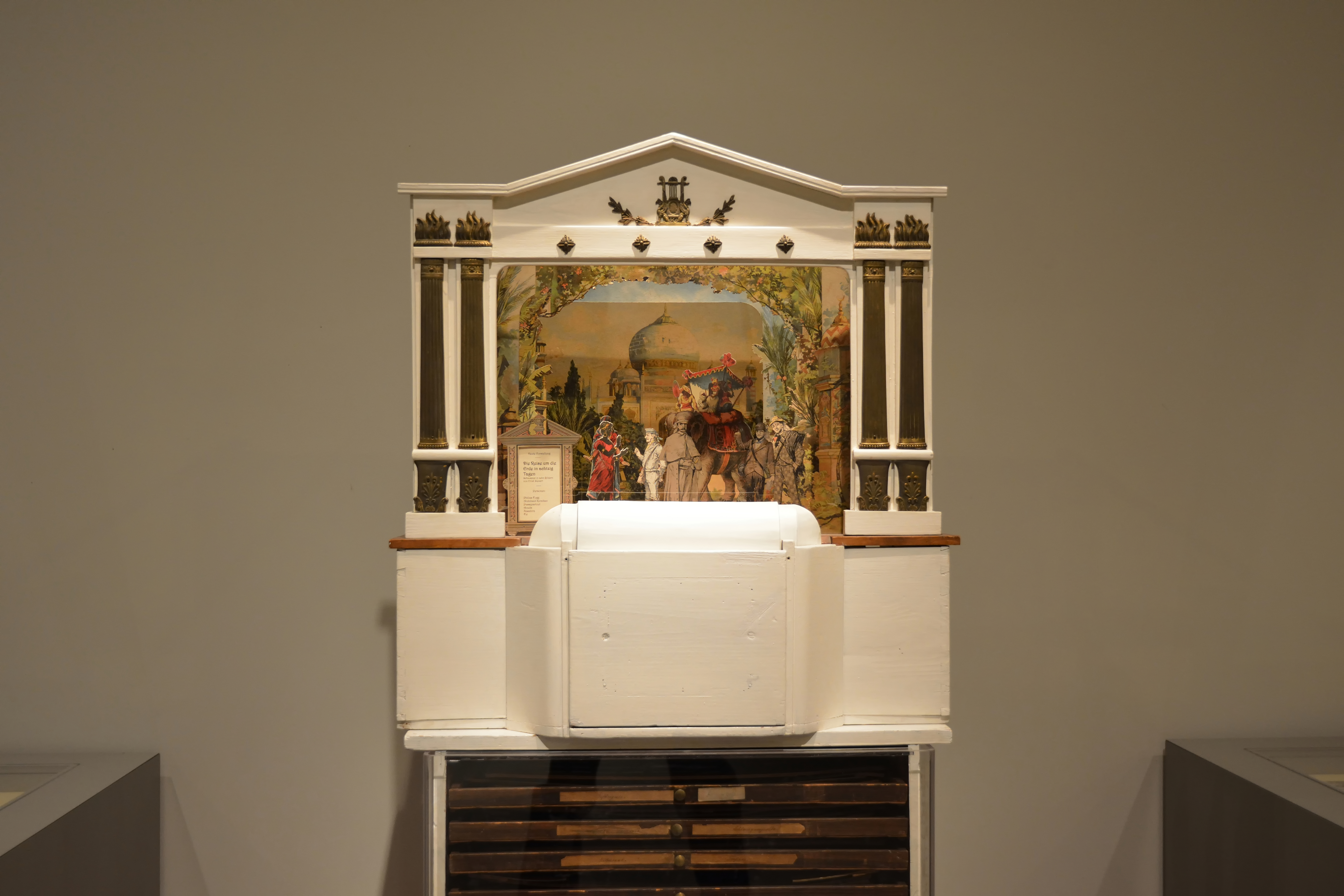 Impressionen aus dem Museum Europäischer Kulturen in Berlin. Ausstellungsstück: Papiertheater:Reise um die Erde in 80 Tagen[1]